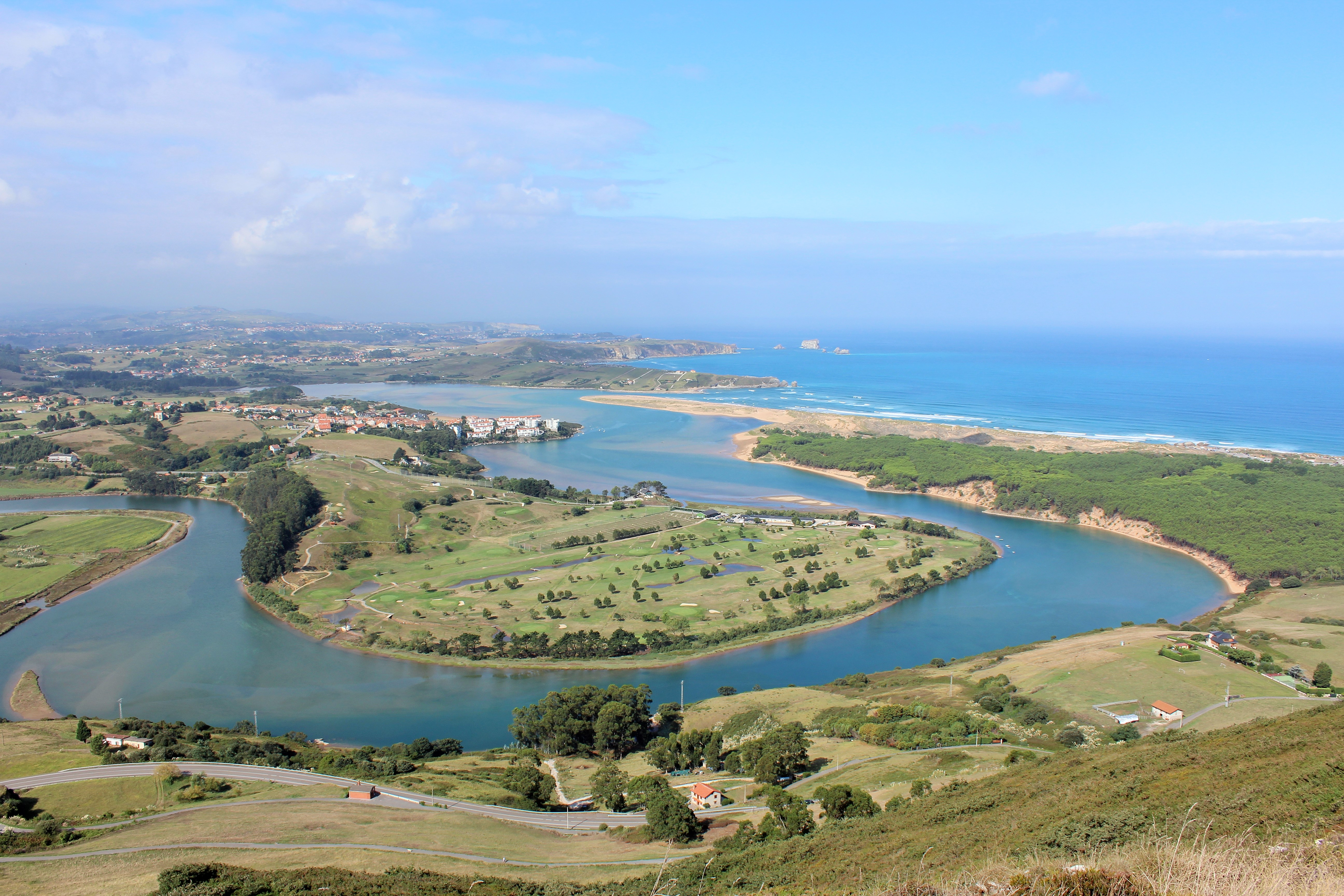 Estuario y desembocadura del río Pas